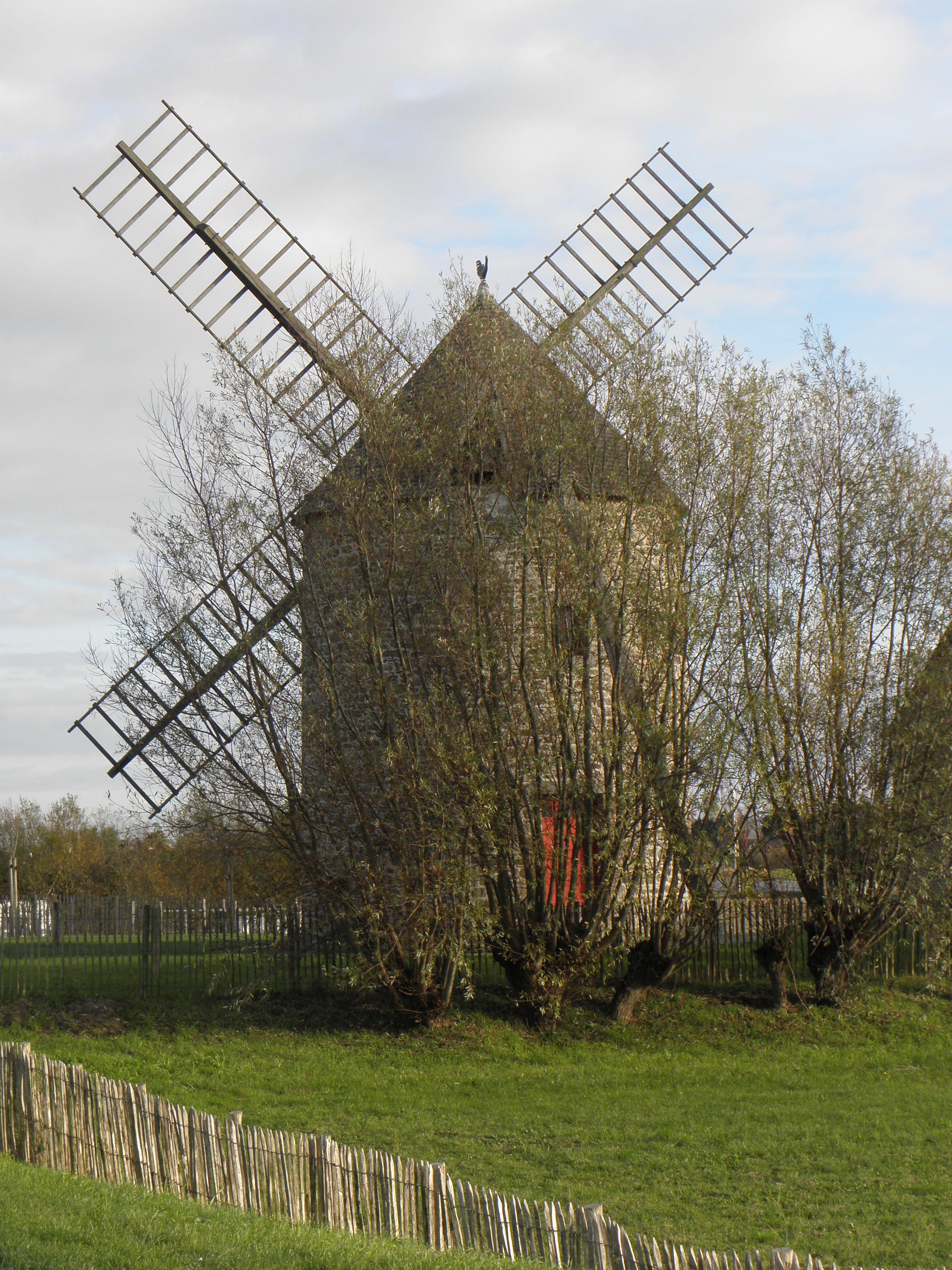 Le Moulin de la Saline à Cherrueix (35).